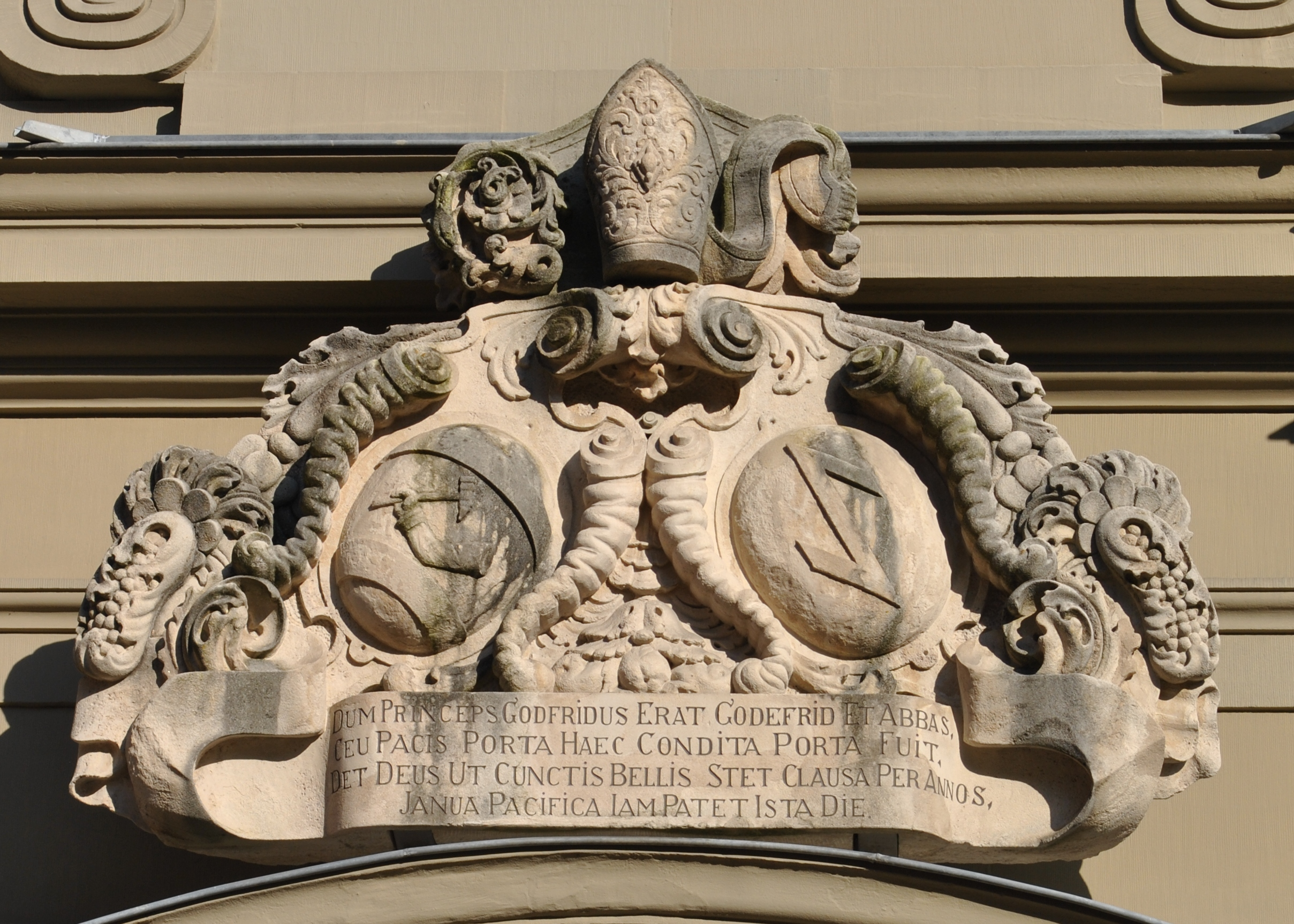 Katholische Klosterkirche Sankt Michael, dreischiffige Säulenbasilika mit Ostquerschiff und zwei Chortürmen mit Welschen Hauben sowie Westvorhalle, im Kern 2.Hälfte 12. Jahrhundert, Einwölbung 1. H. 17. Jahrhundert, Fassade im römischen Barock 1696, Chor und Chortürme nach Abbruch (1838) 1901 wiedererrichtet, mit Ausstattung, Wappen Abt Gottfried Hammerich D-6-79-209-55